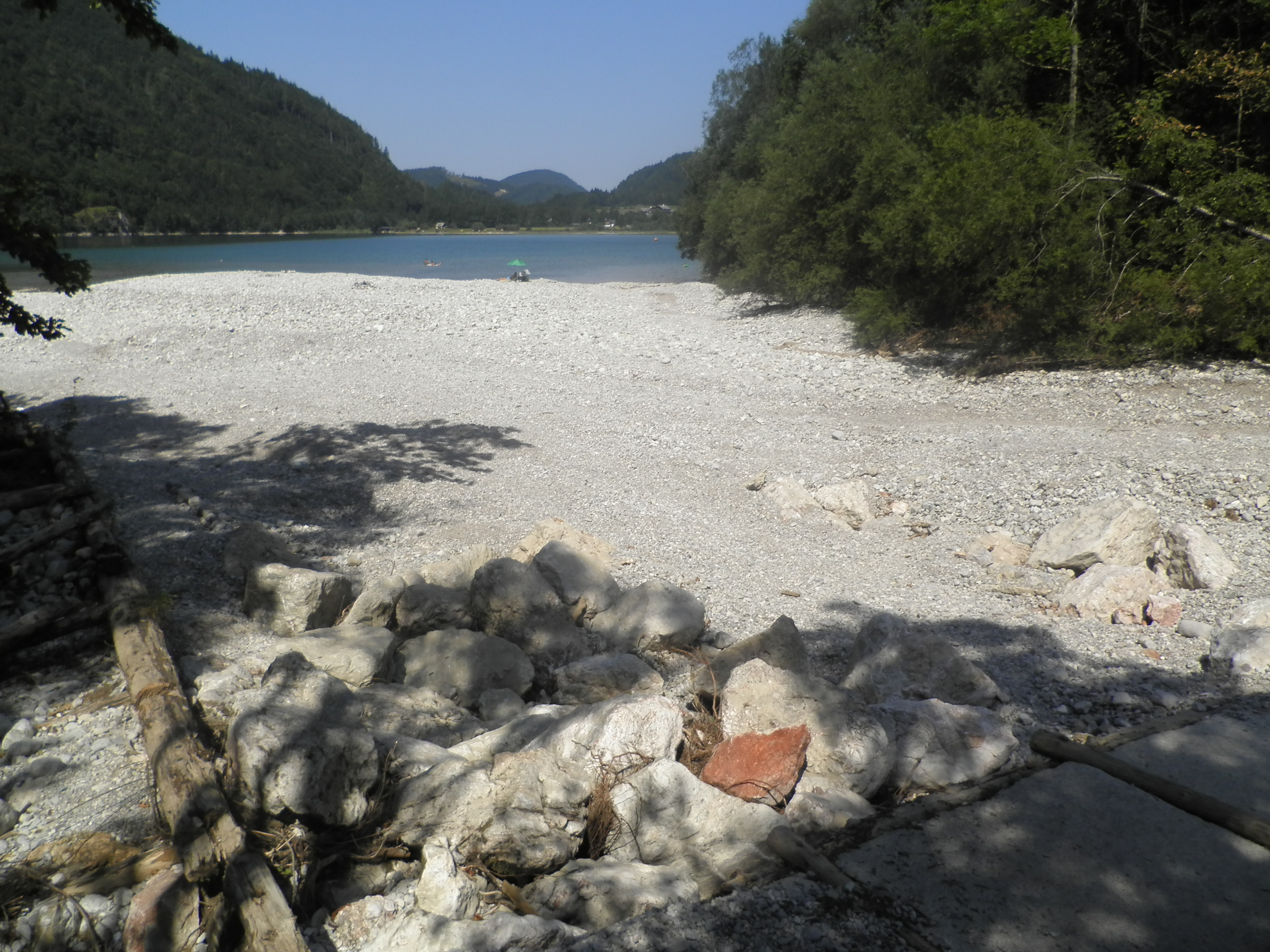 Kiesbank des Tauglbachs, Hintersee